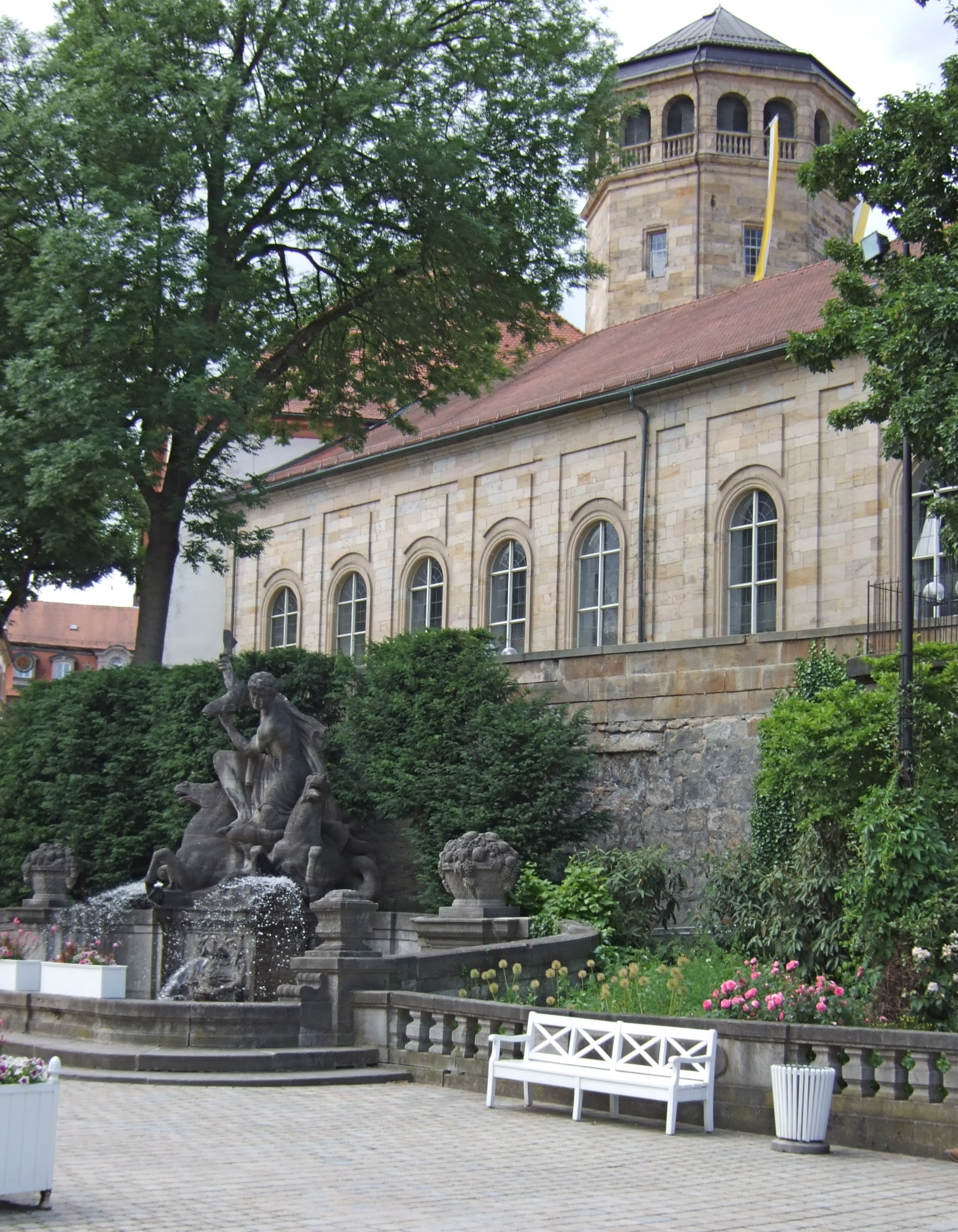 Wittelsbacherbrunnen und Schlossturm Bayreuth